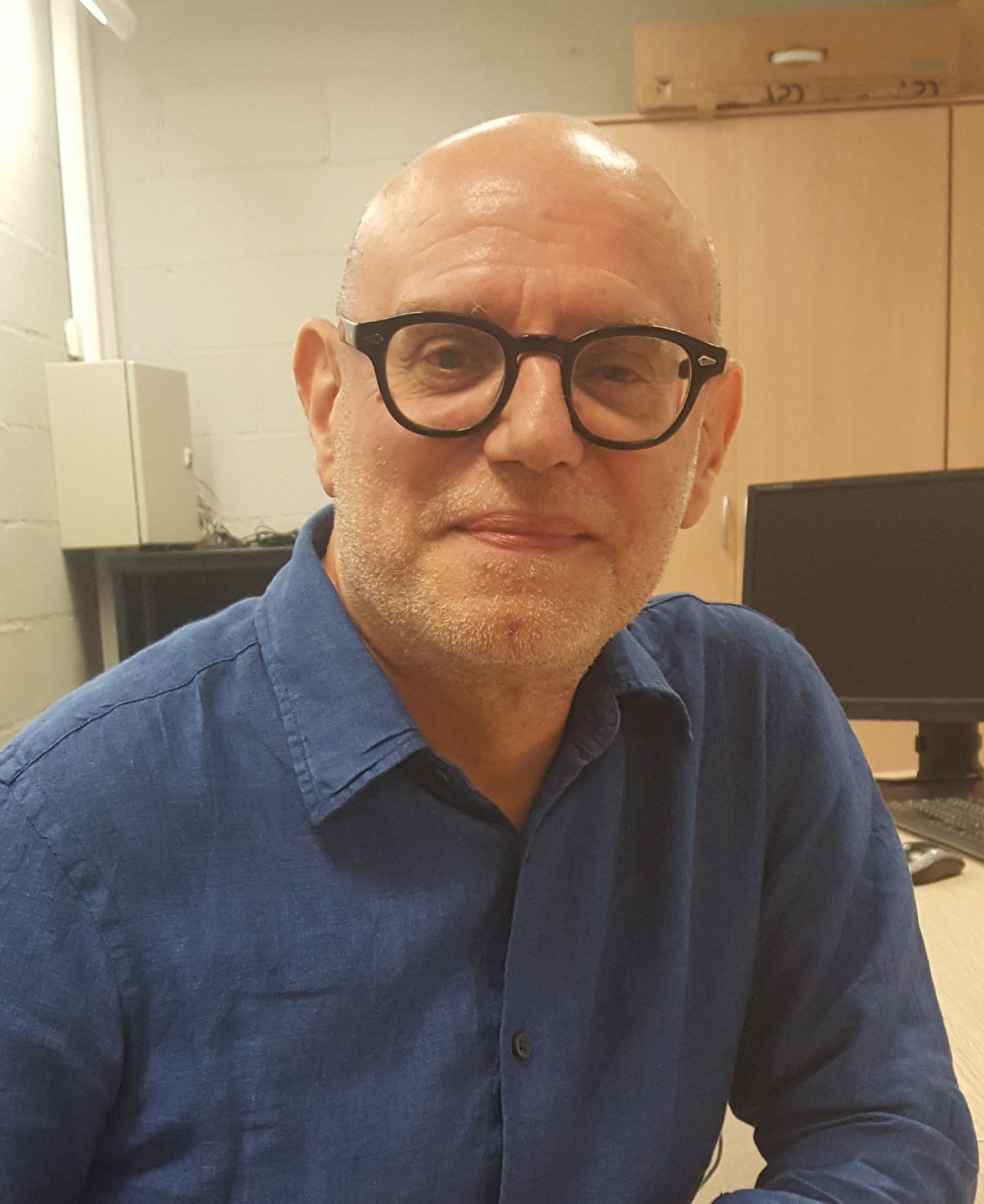 Enzo Traverso a un seminari a la Facultat de Filosofia de la UB, 20190619